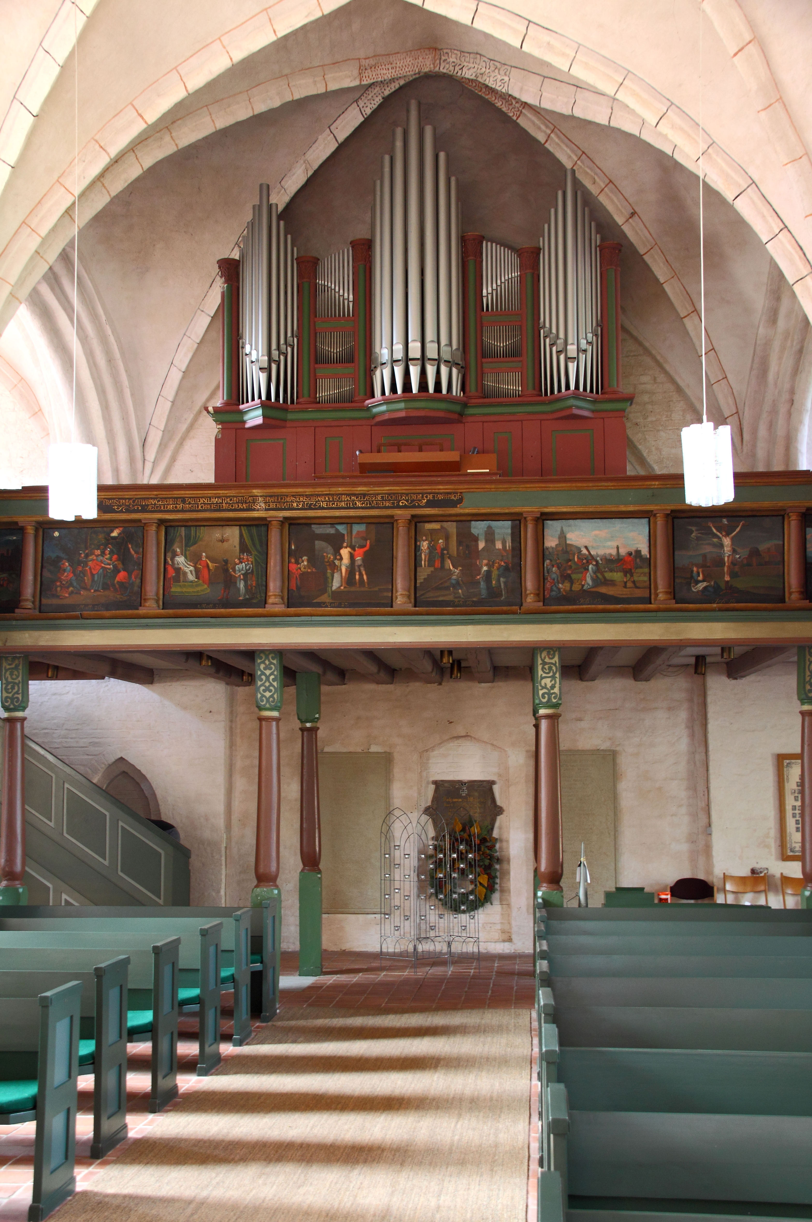 Orgel in Bardewisch